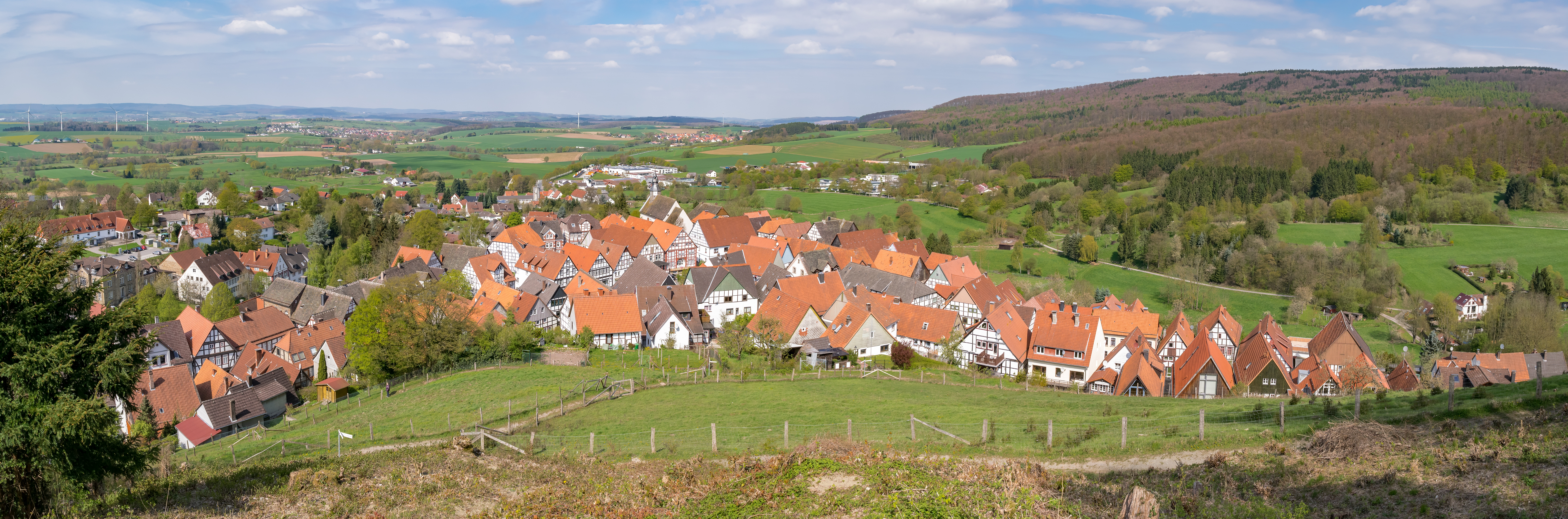 Panorama vom Grafenblick bei Burg Schwalenberg Richtung Nordwest, rechts der Schwalenberger Wald, zwischen Wald und Schwalenberg das LSG Lippebachtal, ansonsten noch das LSG Lipper Bergland mit Steinheimer Becken, Blomberger Höhen, Sabbenhauser Mulde und Schwalenberger Höhen